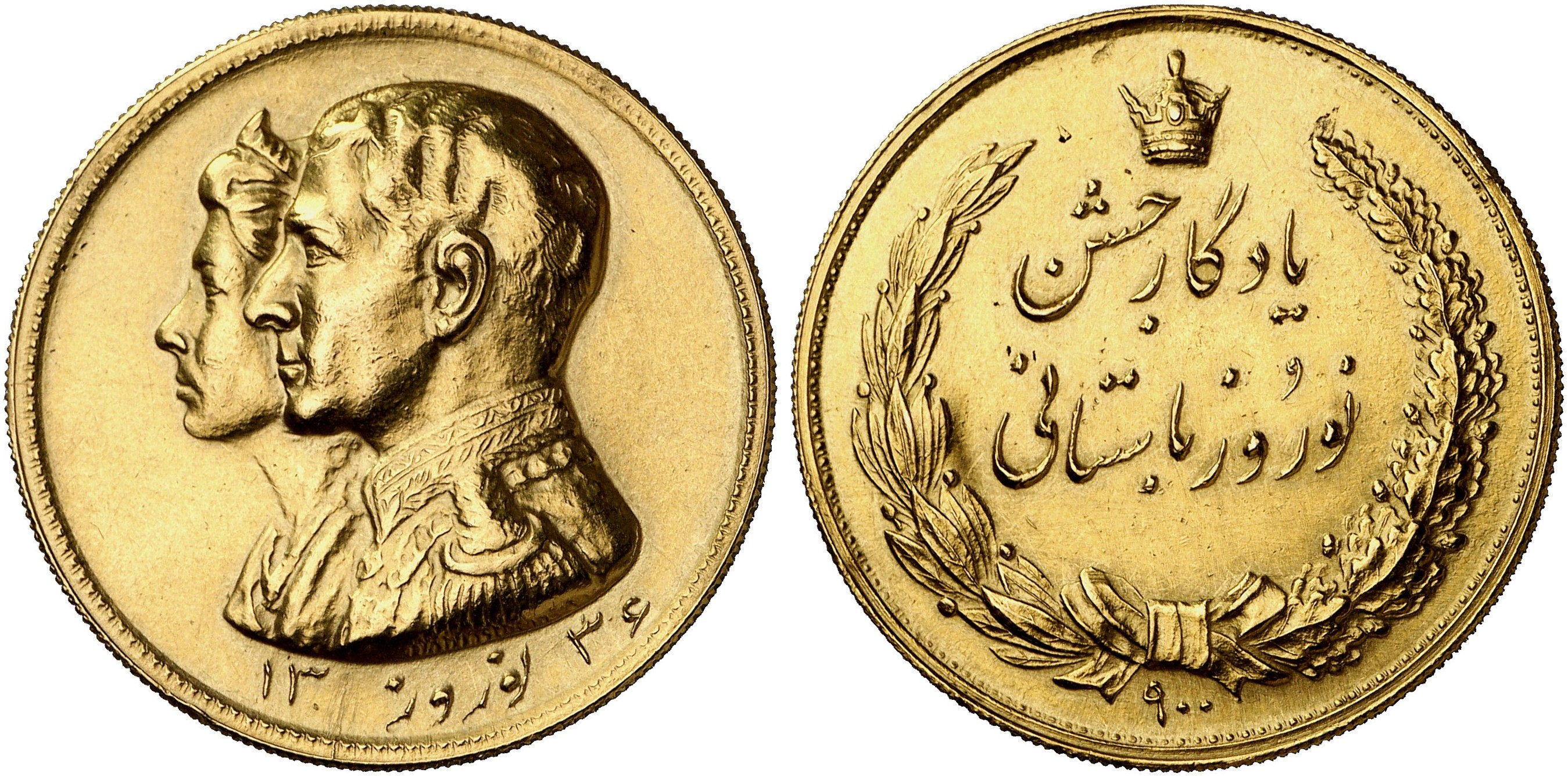 مدال طلای یادبود محمدرضا پهلوی و ثریا بمناسبت نوروز ۱۳۳۶ خورشیدی